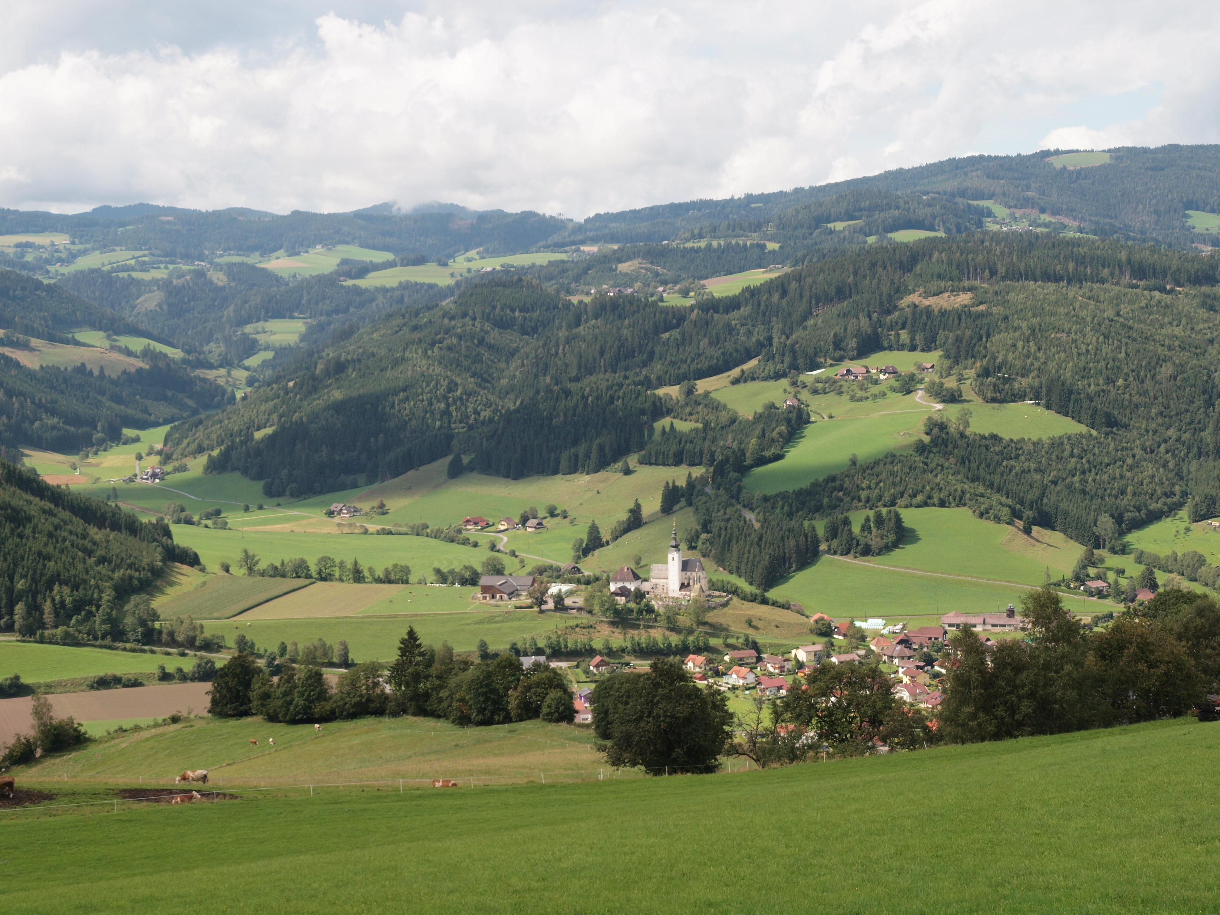 Blick über Strassburg. In der Bildmitte die Kirchsiedlung Lieding; rechts davor ein Teil der Stadt Straßburg; dahinter die Streusiedlung Herd.